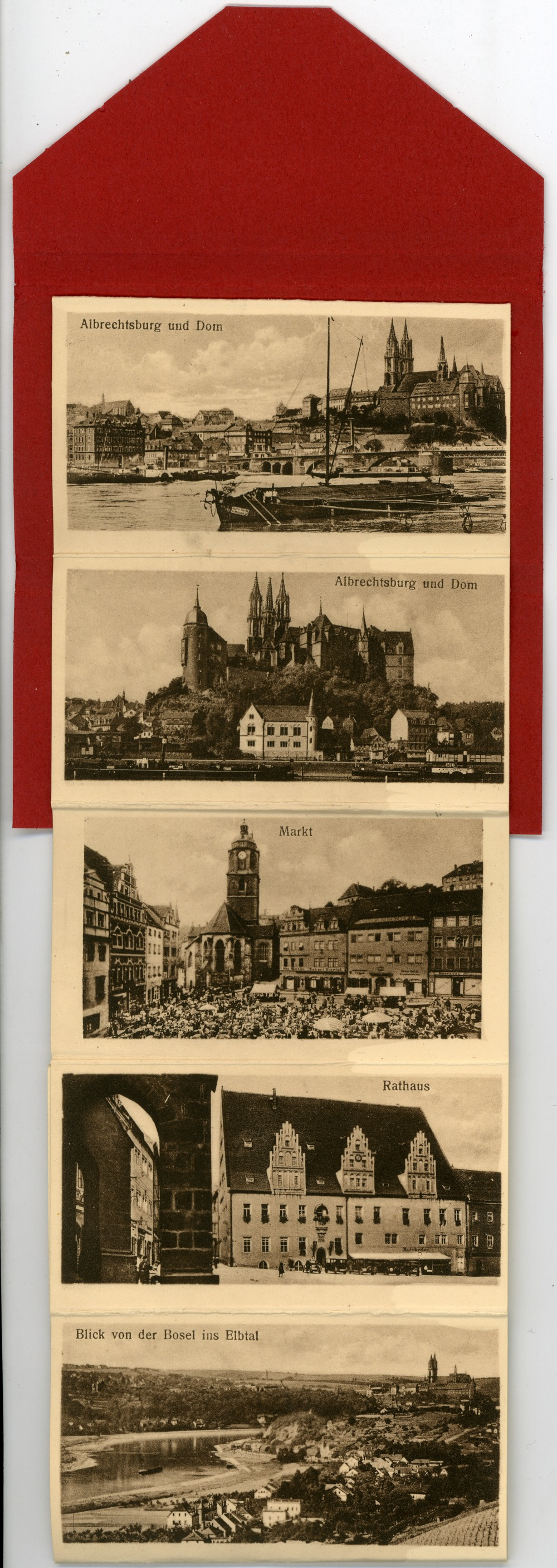 Meißen; Leporello This postcard is from publisher Brück & Sohn in Meißen ( This postcard has a unique number 24695 and is available in a higher resolution at the publisher. This images was uploaded in a cooperation project between Wikipedians and the publisher.